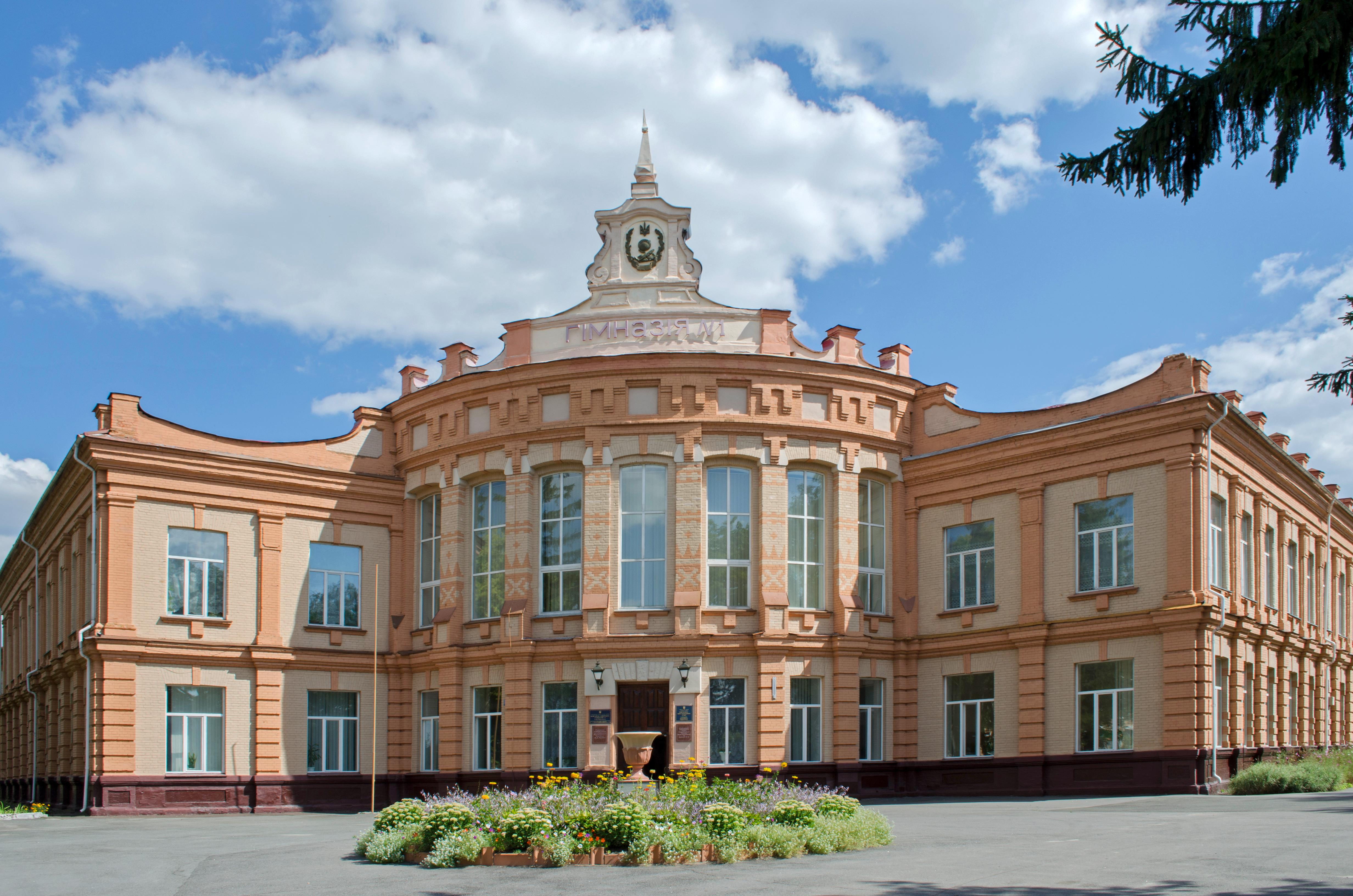 Будинок жіночої гімназії, Новгород-Сіверський, вул. Майстренка, 2